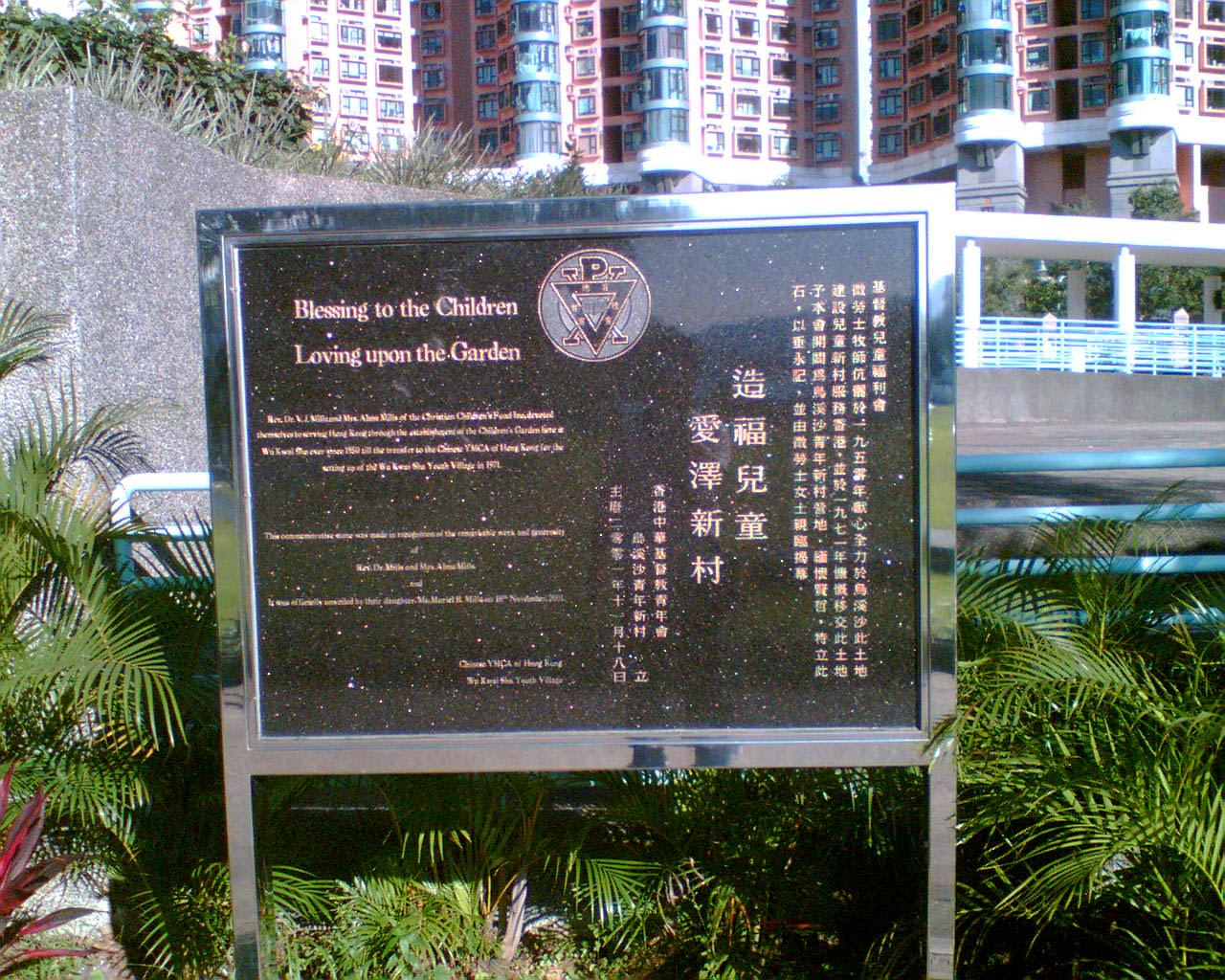 中文（香港）: 烏溪沙青年新村紀念石牌。